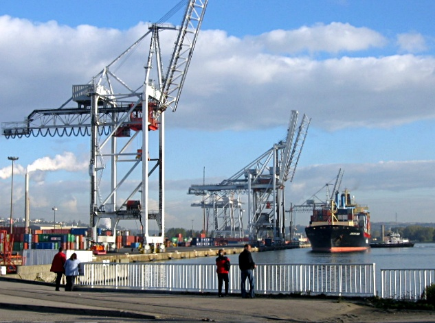 Le Havre Harbour